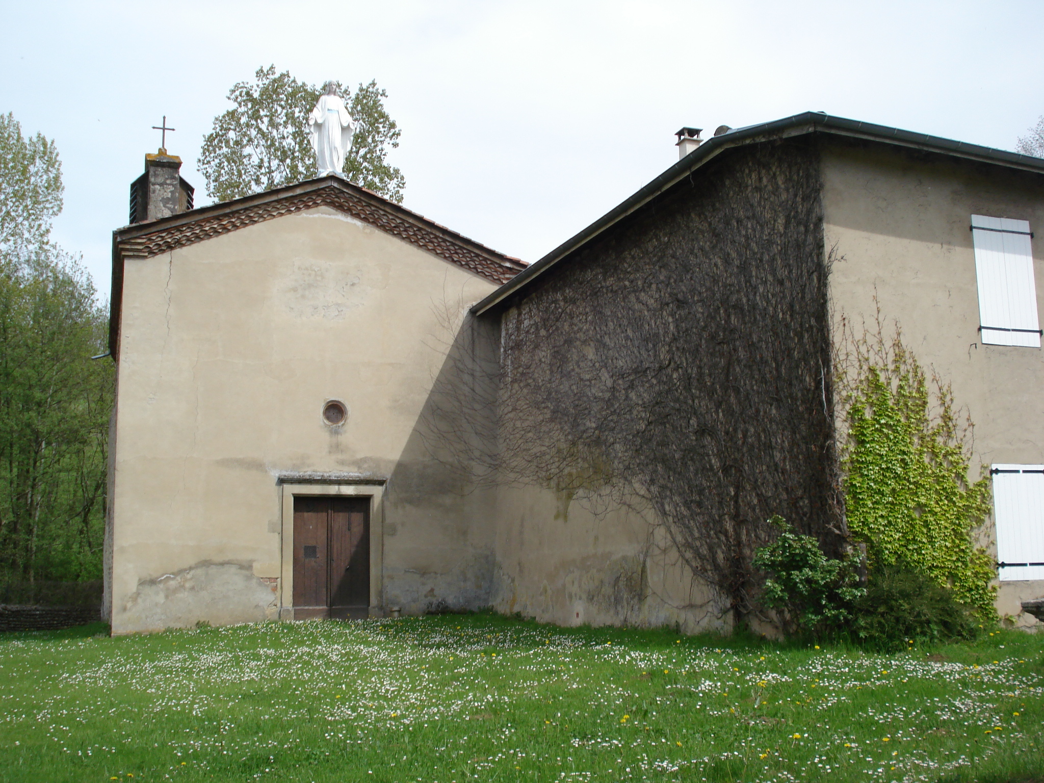 Notre Dame de bonnecombe à Hauterives (Drôme)